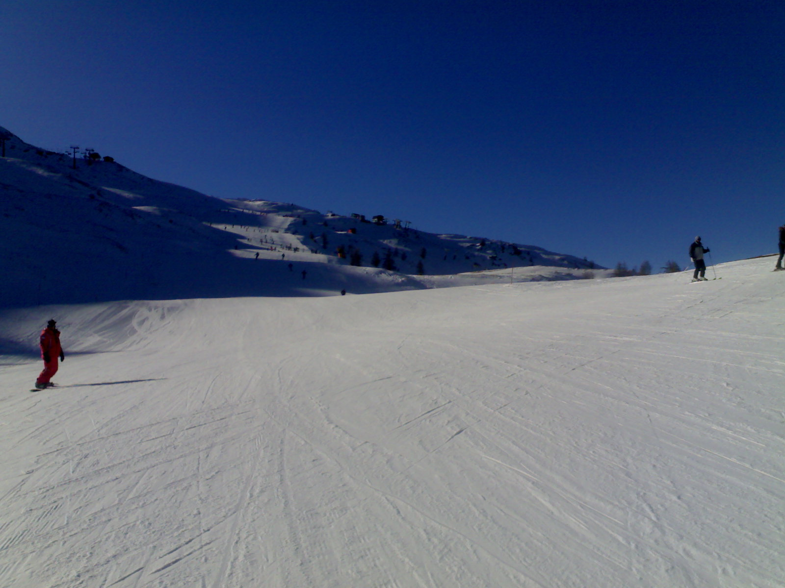 davidhc